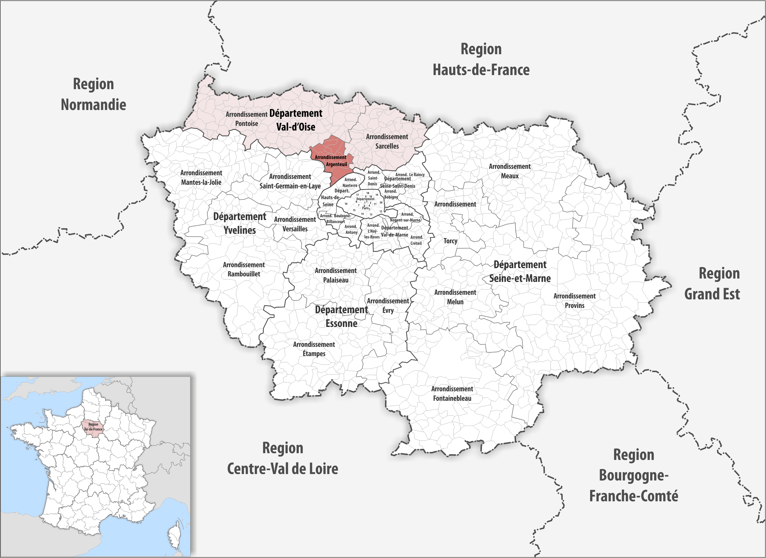 Lage des Arrondissements Argenteuil